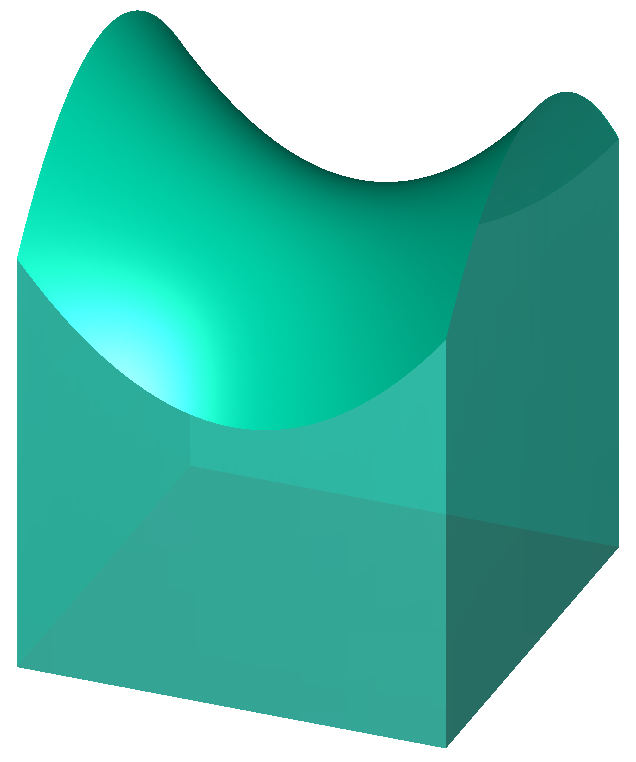 Illustration of volume under a surface (double integral)